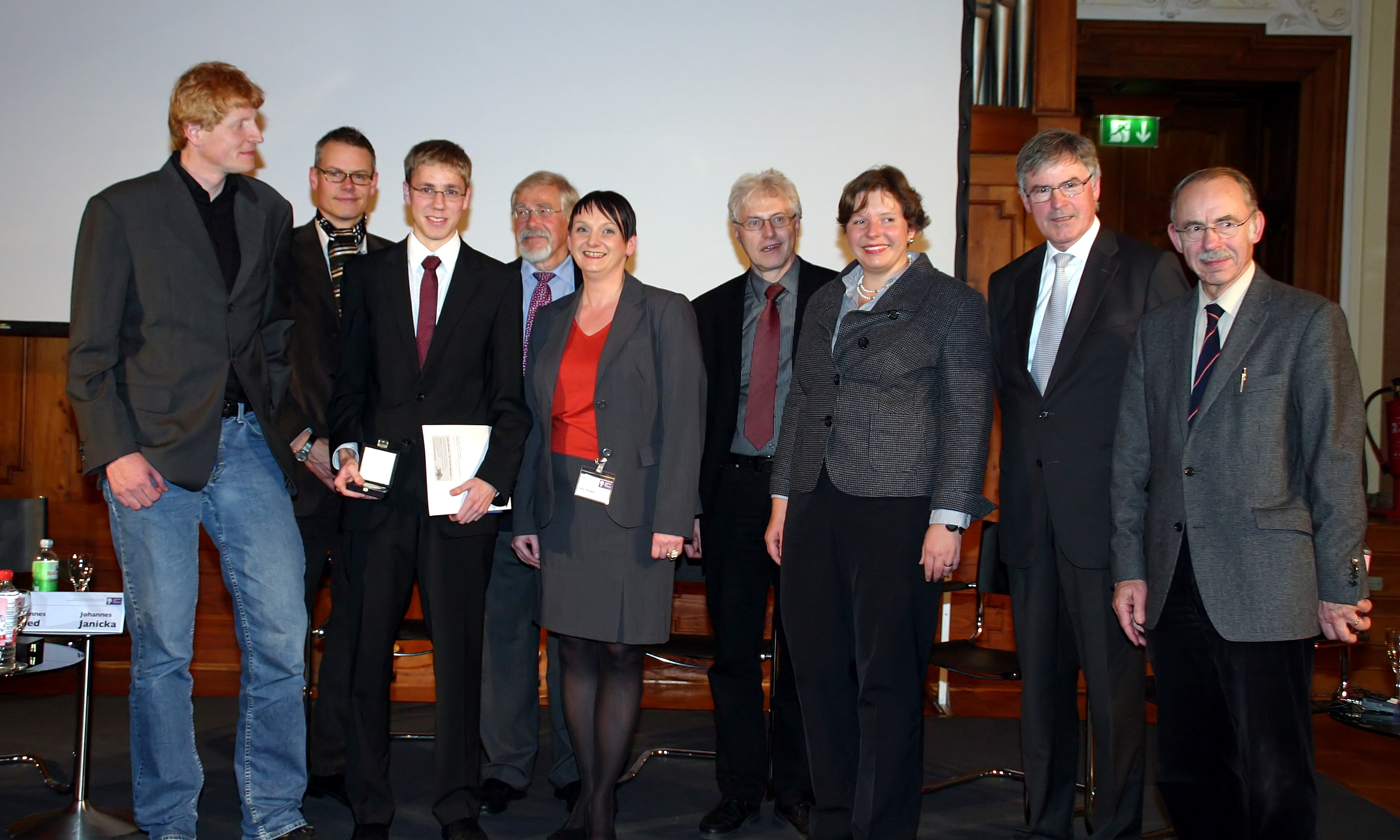 Gruppenbild mit der Jury: Gewinner der Zedler-Medaille 2010: Jürgen Erbs (1. von links) für die Besselschen Elemente und Tobias Lutzi (3. von links) für Dagobert Duck